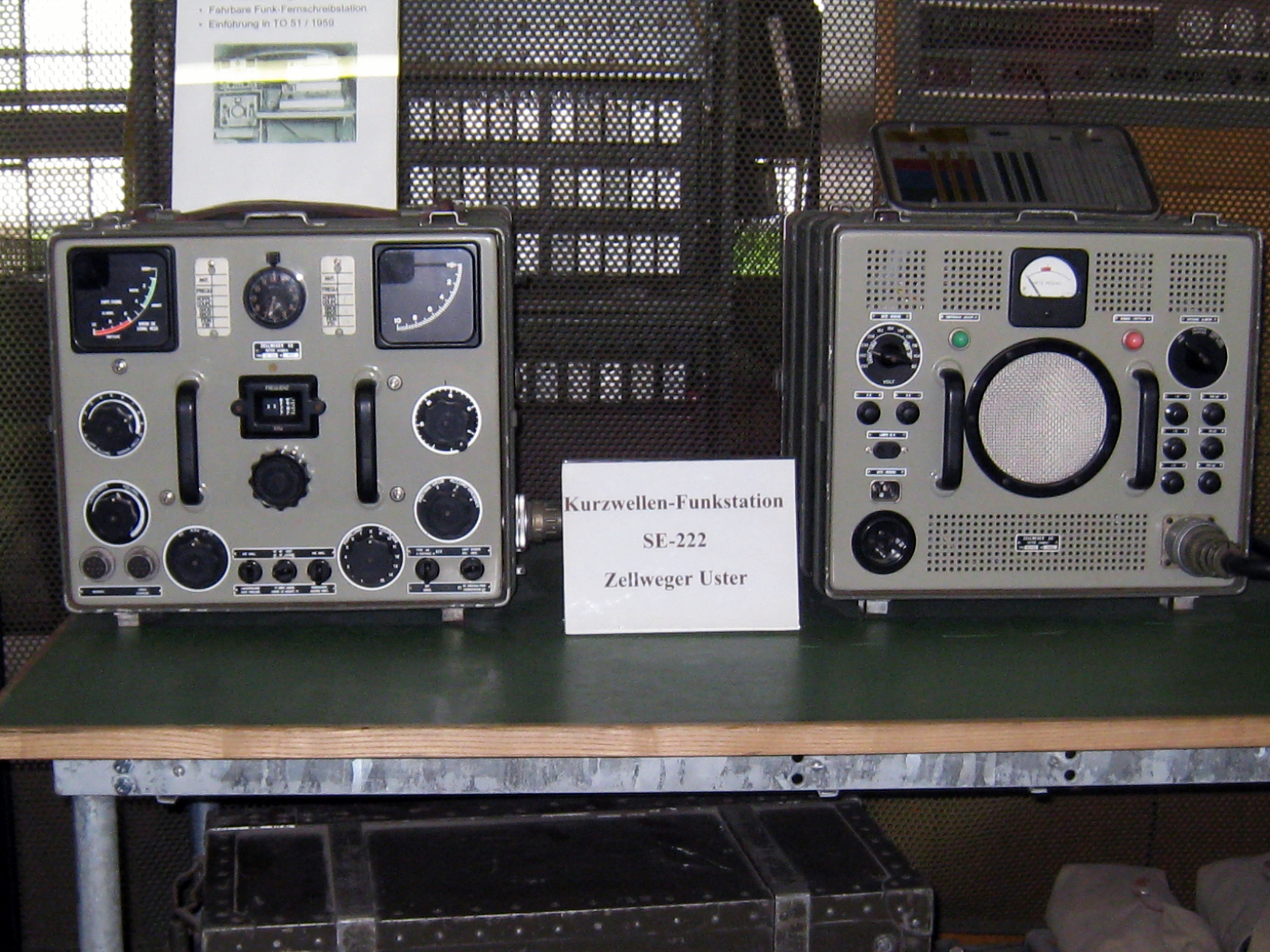 Funkstation SE-222 der Schweizer Armee im Militärmuseum Full